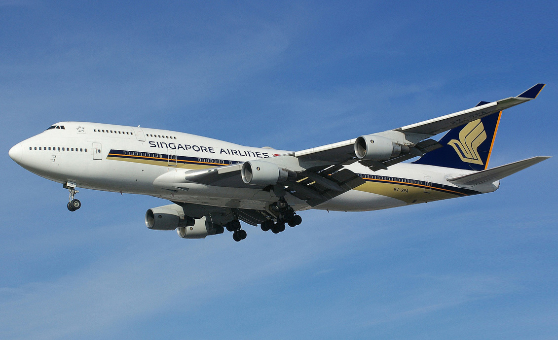 9V-SPA / Boeing 747-412 / 26550/1040 / Singapore Airlines